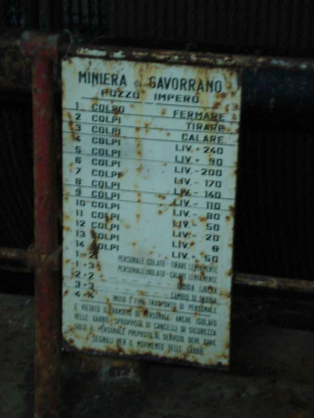 Pozzo Impero, Parco Tecnologico Archeologico delle Colline Metallifere Grossetane